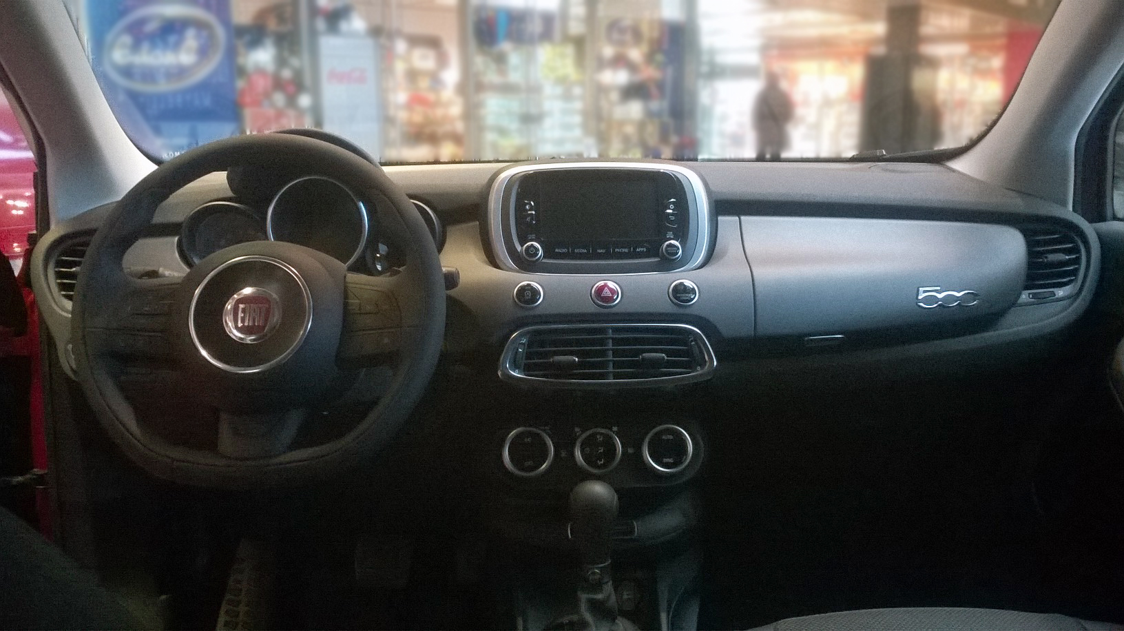 abitacolo e strumentazione di una Fiat 500X versione 4x4 accessoriata